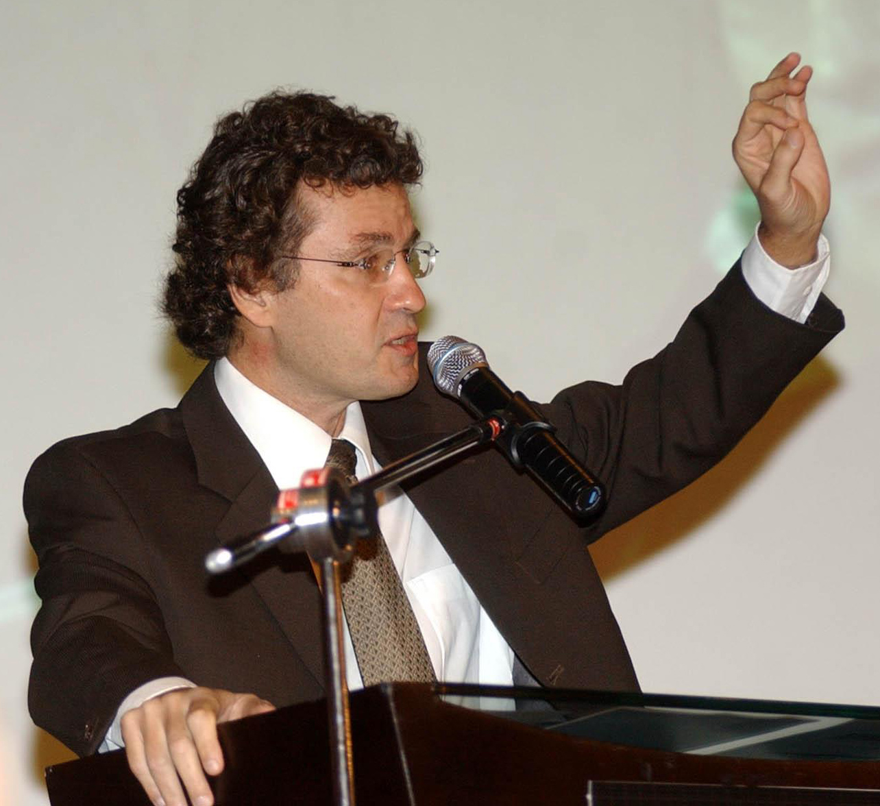 Brasília - O chefe do Departamento Econômico do BNDES, Armando Castelar Pinheiro, durante 18º Congresso de Mercado de Capitais. Local: Hotel Blue Tree. Foto: Roosewelt Pinheiro